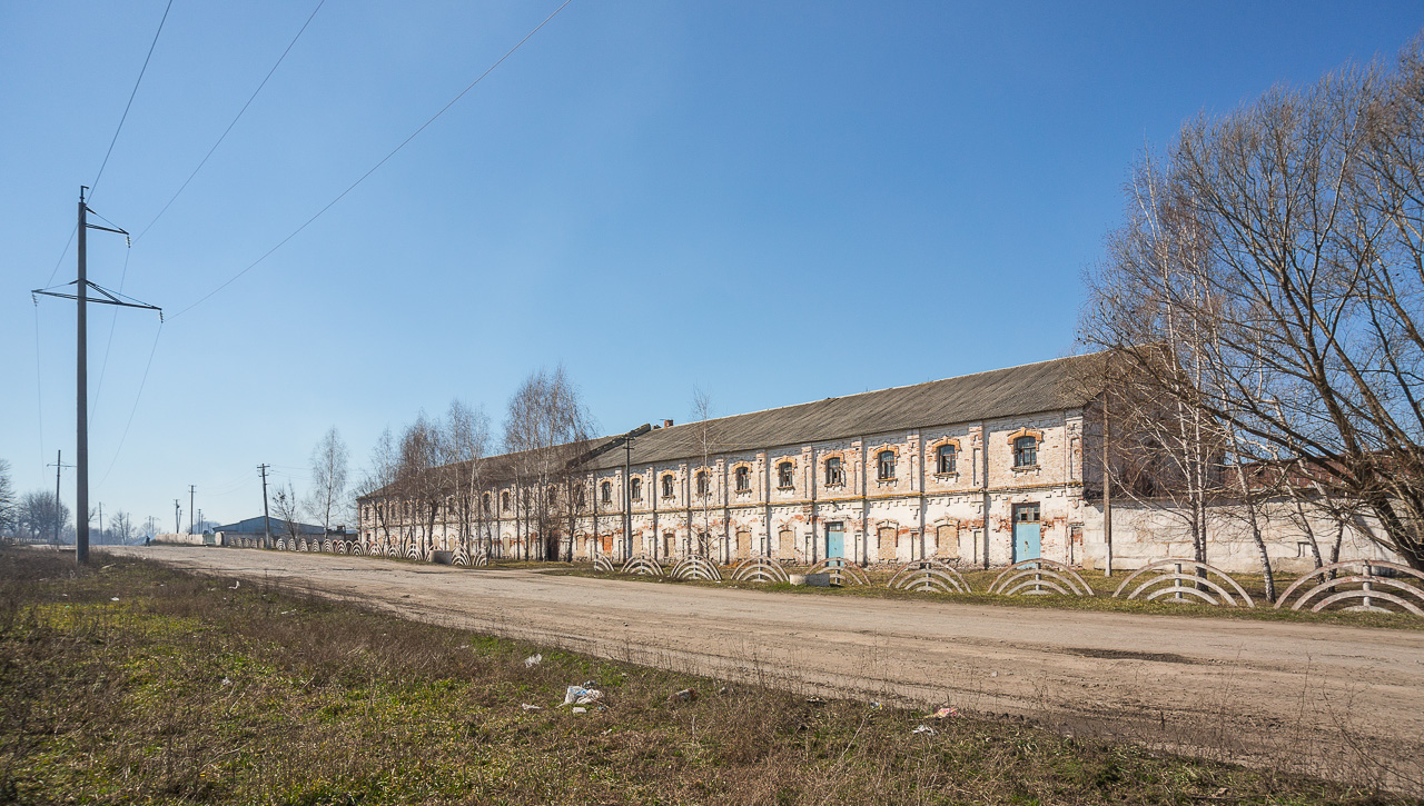 Цукроварний завод, Білий Колодязь